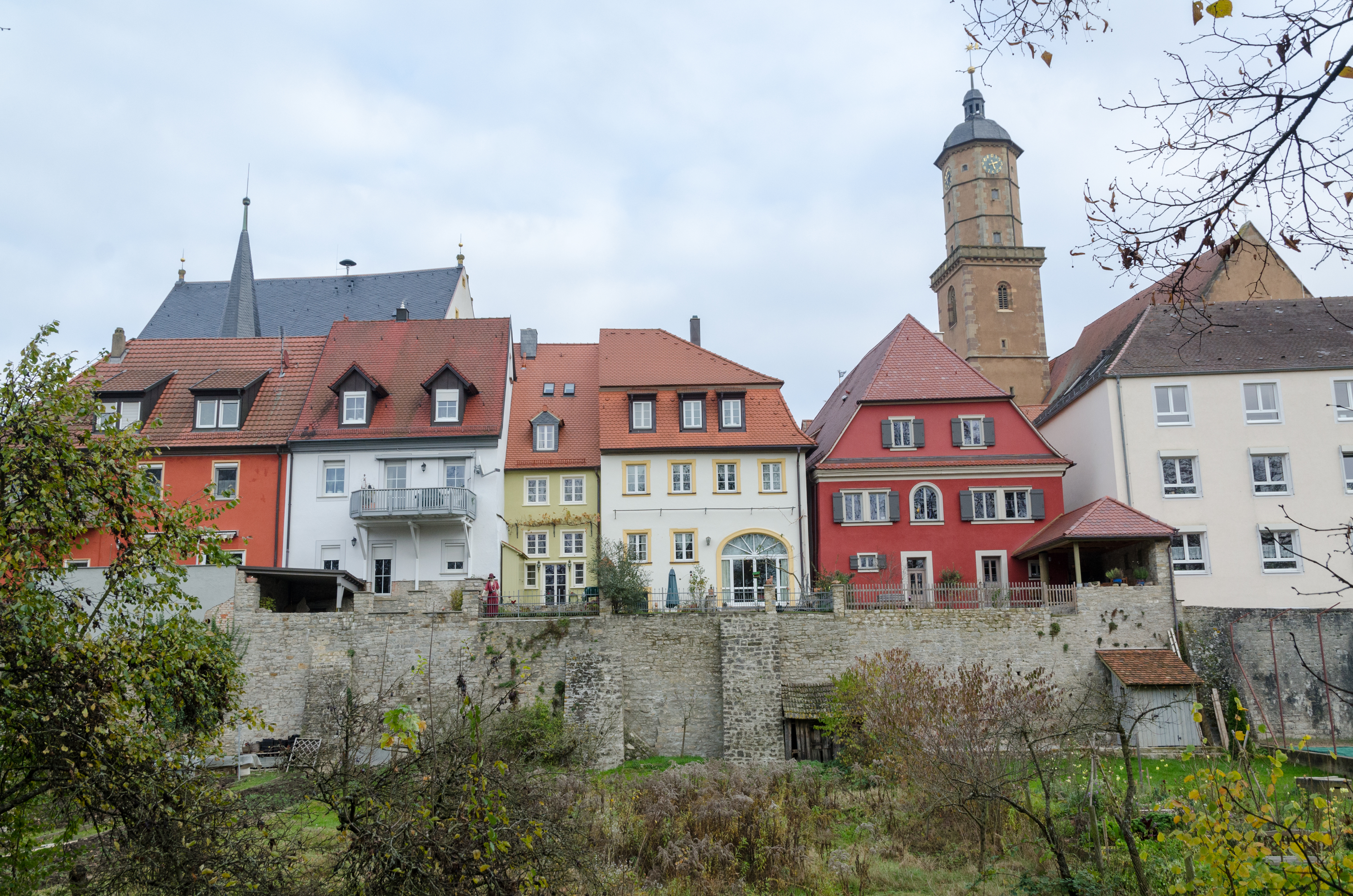 Volkach, Stadtmauer, Schulgasse 4, 3, Badgasse 2, 2a, 4